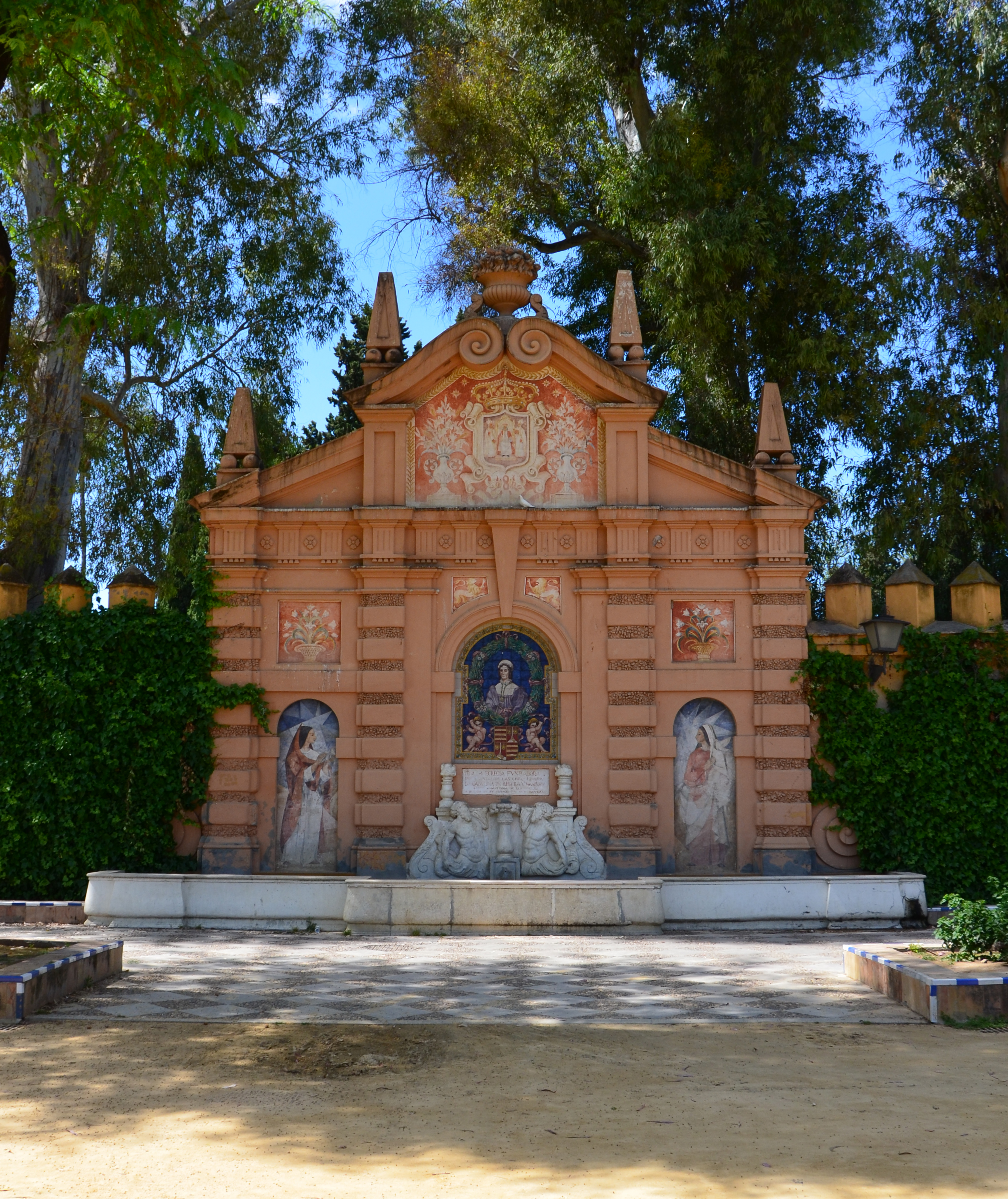 Fontaine de style néo-maniériste de Juan Talavera y Heredia, décorée de peintures de Juan Miguel Sanchez, dédiée à Catalina de Ribera. Elle se trouve sur la promenade de Catalina de Ribera, adossée aux murailles de l'Alcazar de Séville (Espagne).